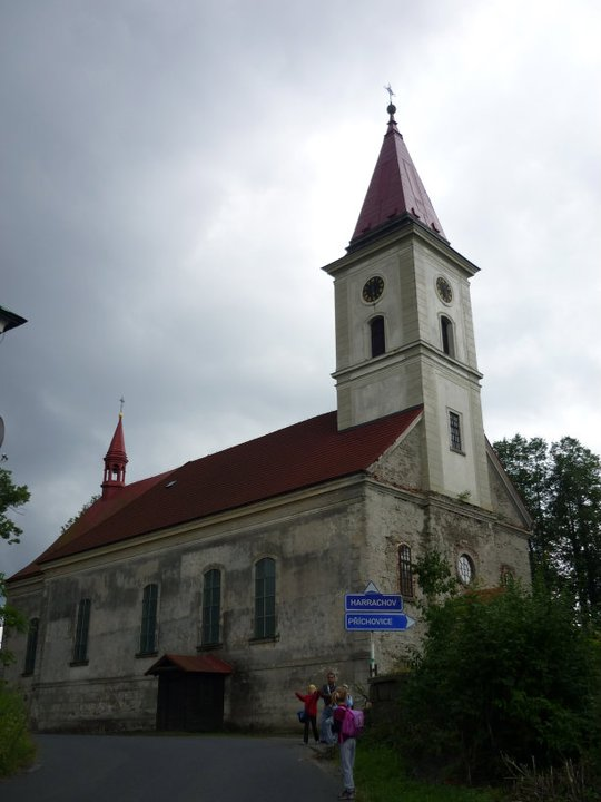 Kostel svatého Jana Křtitele v Kořenově-Polubném